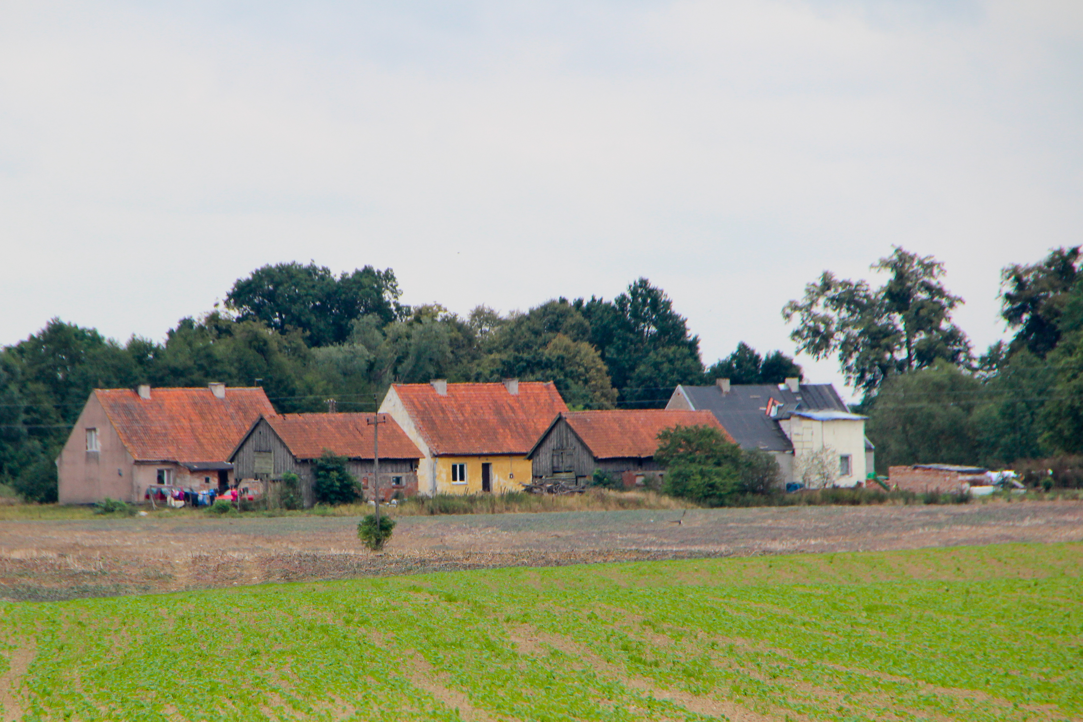 Sławosze - przysiółek osady Święty Kamień w Polsce w województwie warmińsko-mazurskim, w powiecie kętrzyńskim, w gminie Barciany.